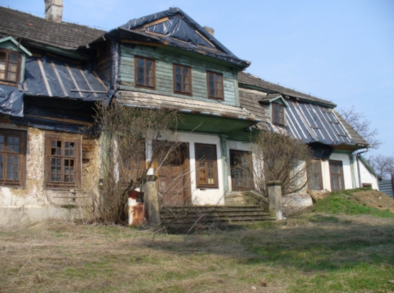 XVIII-wieczny dwór w Raciechowicach (zabytek nr A-612/M)